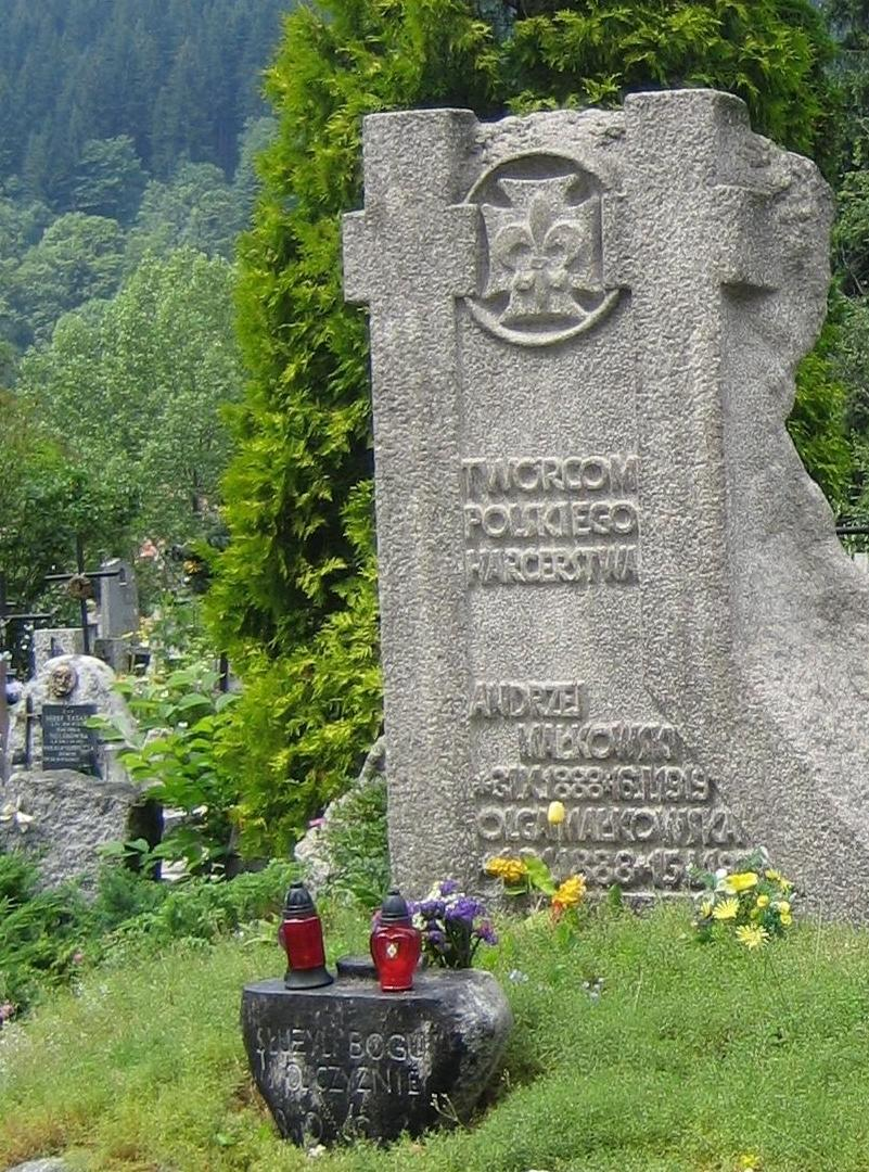 Grób Malkowskich